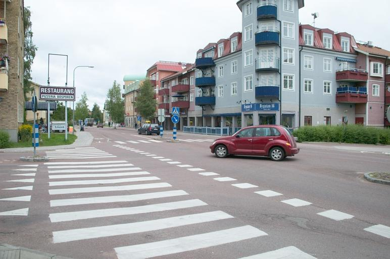 Leksandsvägen söderut , affärshuset i kvarteret Hantverkaren. Motiv: Leksand Kategori: Stadsmiljö Leksandsvägen söderut , affärshuset i kvarteret Hantverkaren.